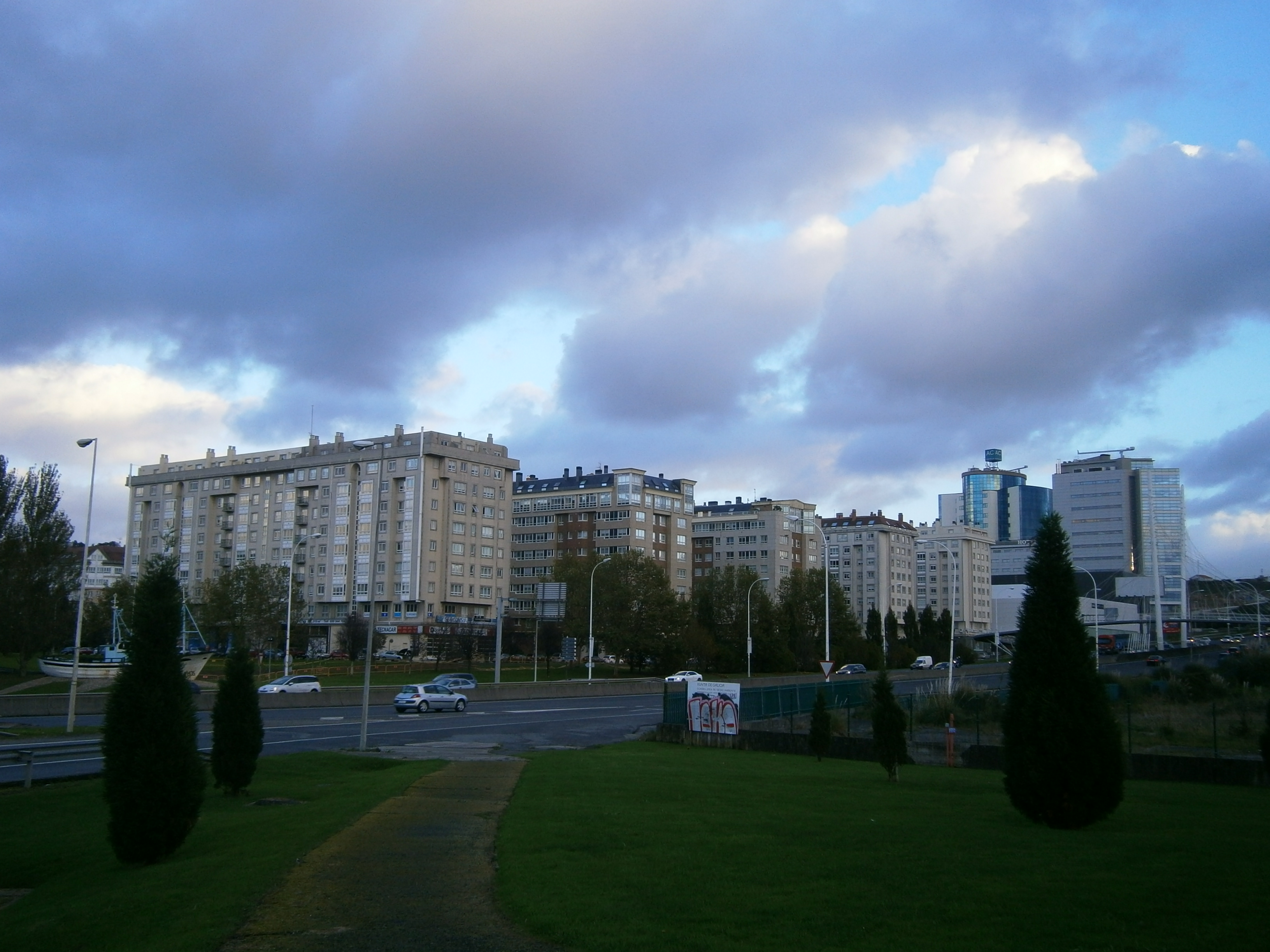 Matogrande, A Coruña